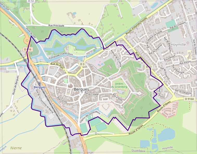 carte réalisée sur umap This map may be incomplete, and may contain errors. Don't rely solely on it for navigation.